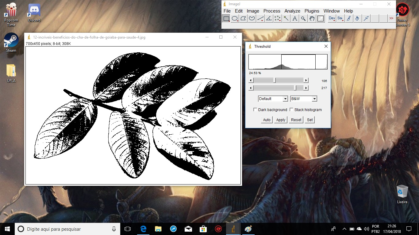 Passo 4.